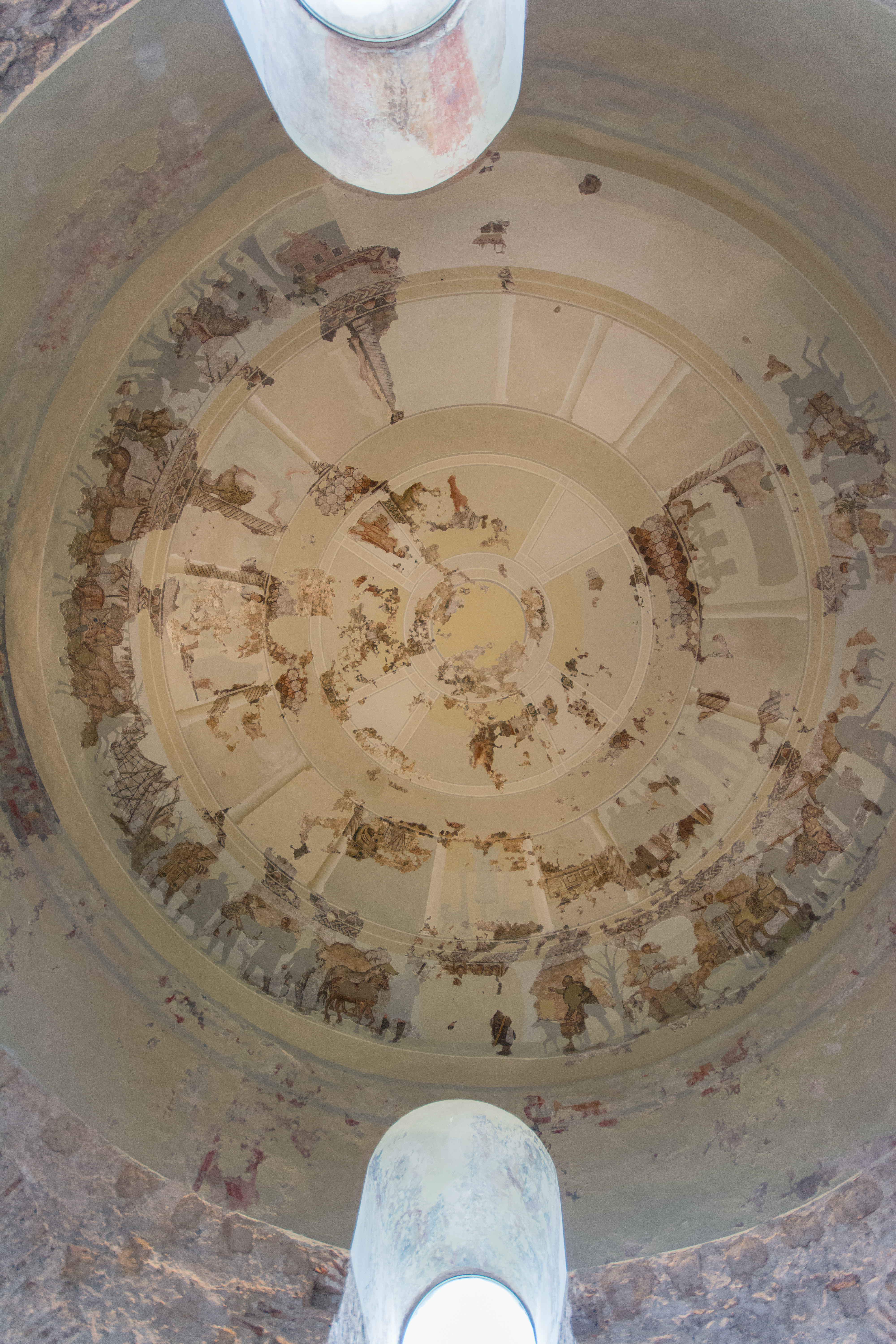 La cúpula estaba cubierta en su totalidad por un mosaico polícromo con varias escenas distribuidas en tres zonas: en el friso interior se reproduce una escena de caza; en el friso intermedio se representan dieciséis escenas del Antiguo y Nuevo Testamento, separadas por columnas, mientras que en el friso superior hay una representación de las cuatro estaciones del año, alternadas con otras cuatro escenas donde figura un personaje sentado y acompañado por diferentes personas. La composición del mosaico acaba con un medallón central, del cual sólo se conserva un grupo de pequeñas cabezas.